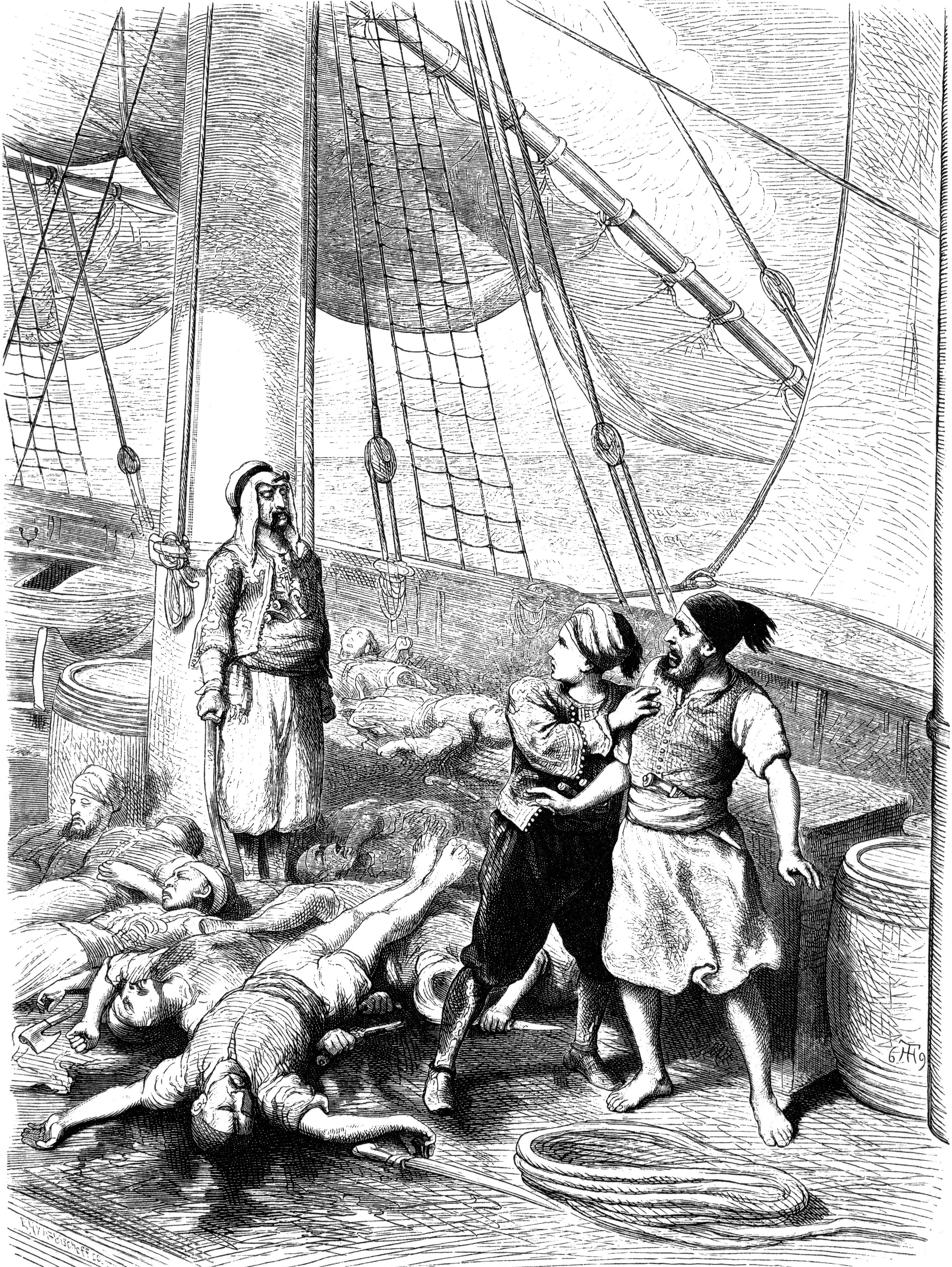 Illustration zu Willhelm Hauffs Kunstmärchen Die Geschichte von dem Gespensterschiff: Achmet und sein Diener entdecken die Leichen der Seeleute